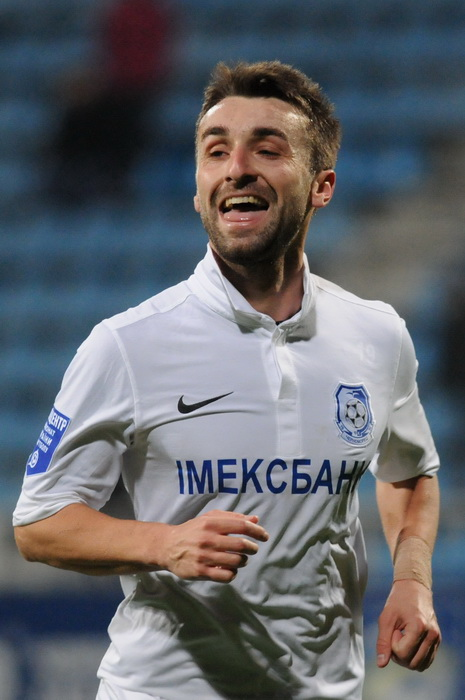 Elis Bakaj